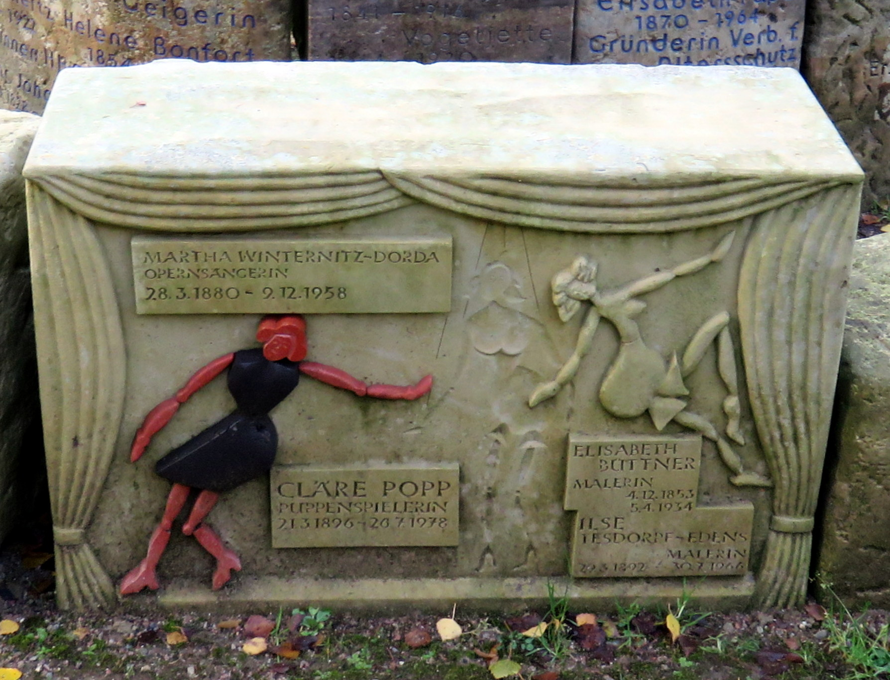 Gedenkstein für die Malerin Elisabeth Büttner in der Erinnerungsspirale im Bereich des Gartens der Frauen auf dem Ohlsdorfer Friedhof in Hamburg-Ohlsdorf, zusammen mit der Sopranistin und Gesangspädagogin MarthaWinternitz-Dorda, der bildenden Künstlerin Cläre Popp und der Malerin llse Tesdorpf-Edens.